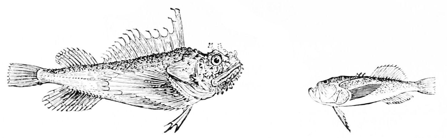 Sea raven and star gazer